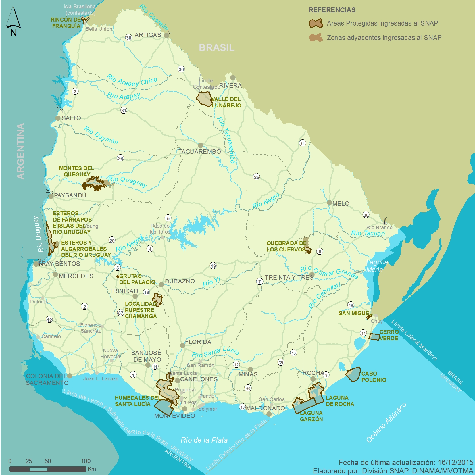 Áreas protegidas ingresadas al SNAP Uruguay - Abril 2016